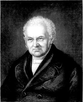 Portrait Gotthilf Heinrich von Schubert